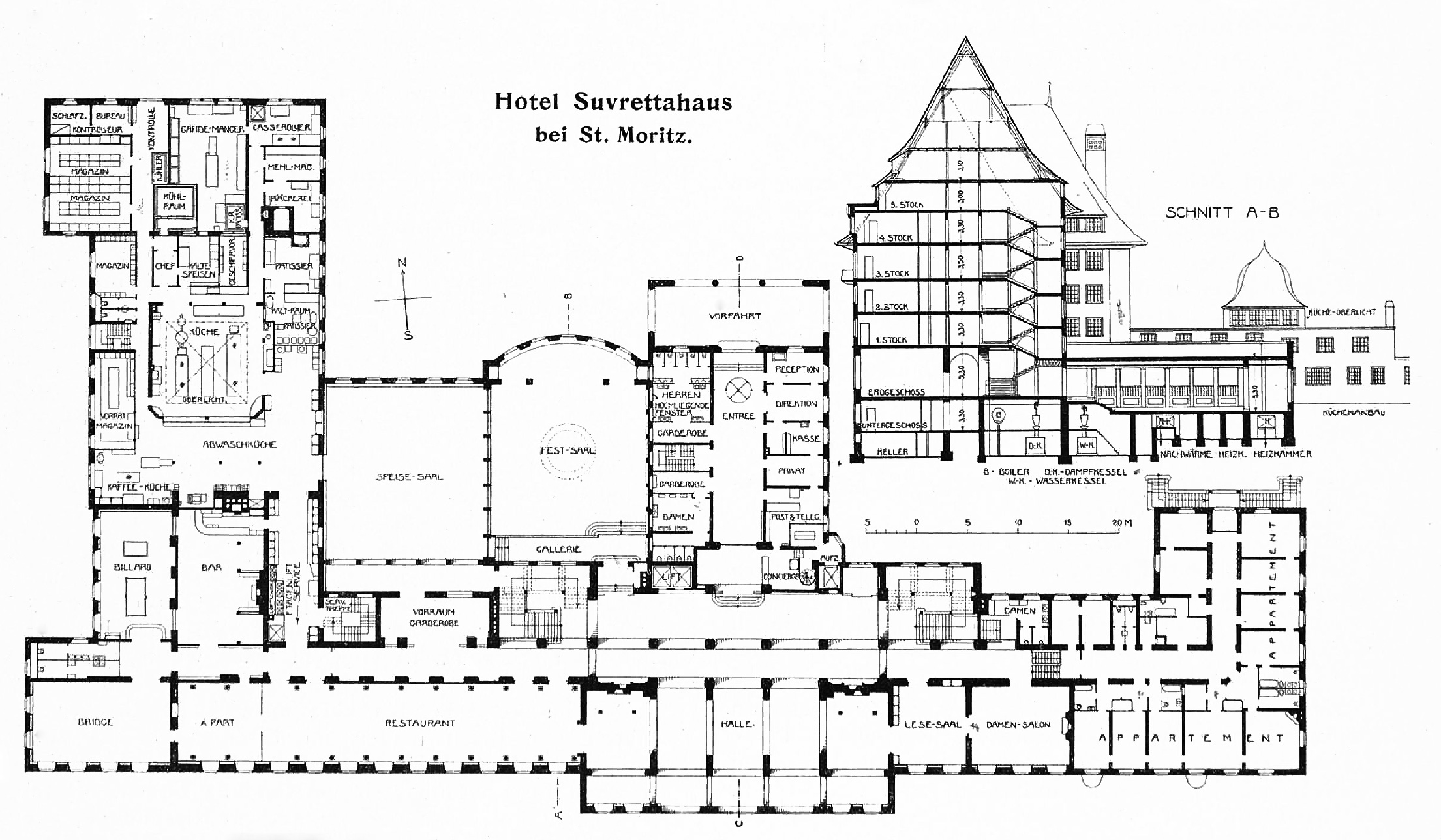 Hotel Suvretta House, Grundriss Erdgeschoss mit Schnitt durch Festsaal und Restaurant